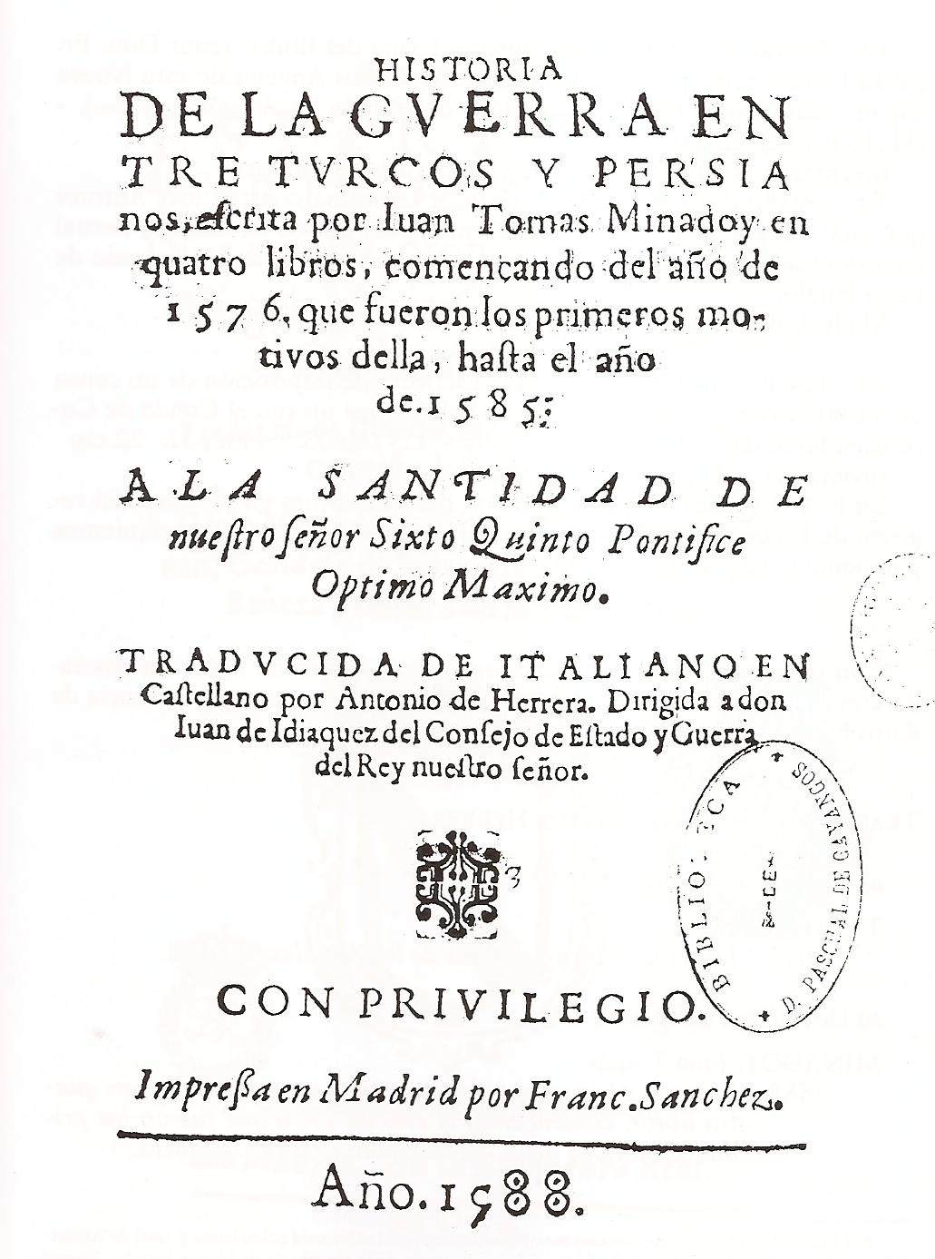 Portada de la obra "Historia de la guerra entre turcos y persianos...", traducción de Antonio de Herrera y Tordesillas, de la obra de Juan Tomás de Minadoy (Del italiano al castellano).